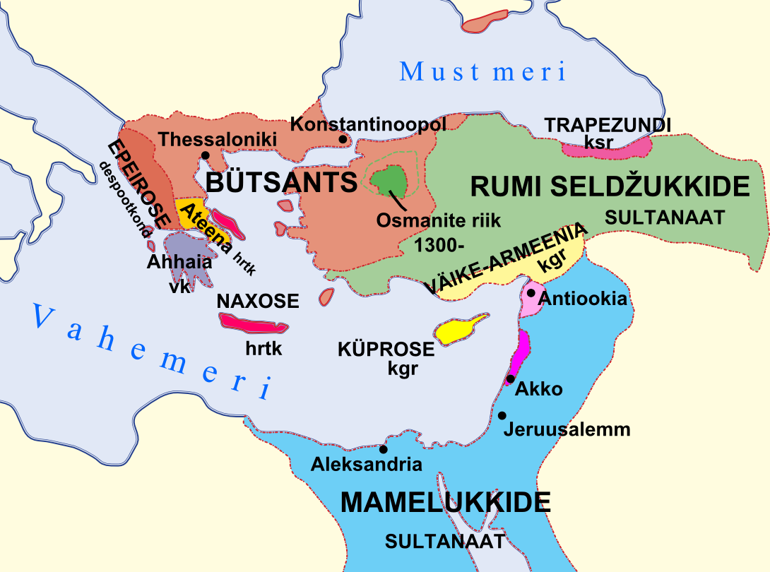 Bütsants (1263)